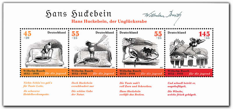 Sonderbriefmarkenserie “Hans Huckebein, der Unglücksrabe”, Blockausgabe zum 175. Geburtstag Wilhelm Buschs, Michel 2606-2609, Block 71